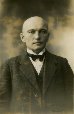 Karl Saral, loomaarstiteadlane